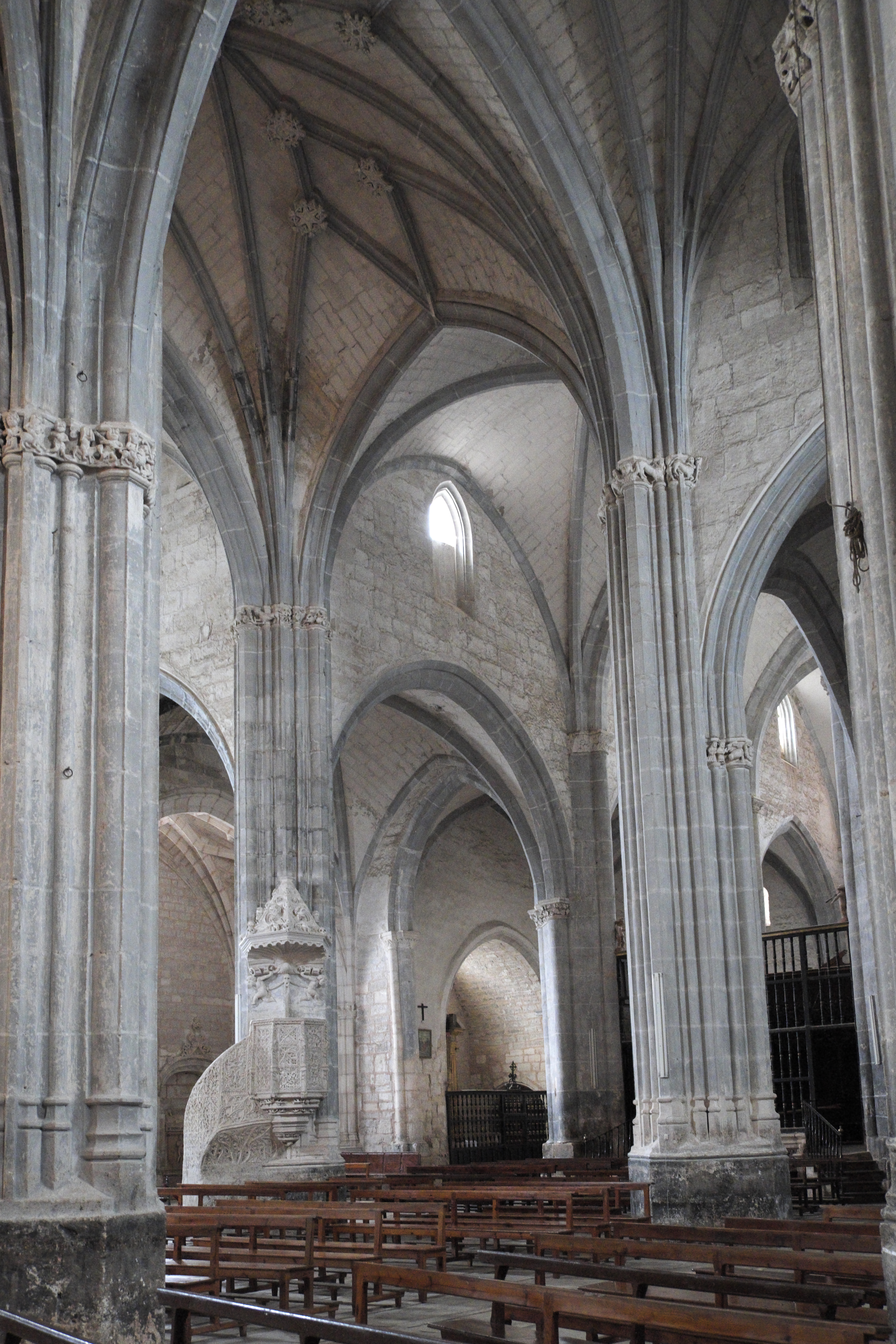 Kirche Asunción de Nuestra Señora (Mariä Himmelfahrt) in Santa María del Campo in der Provinz Burgos (Kastilien-León/Spanien), Innenraum